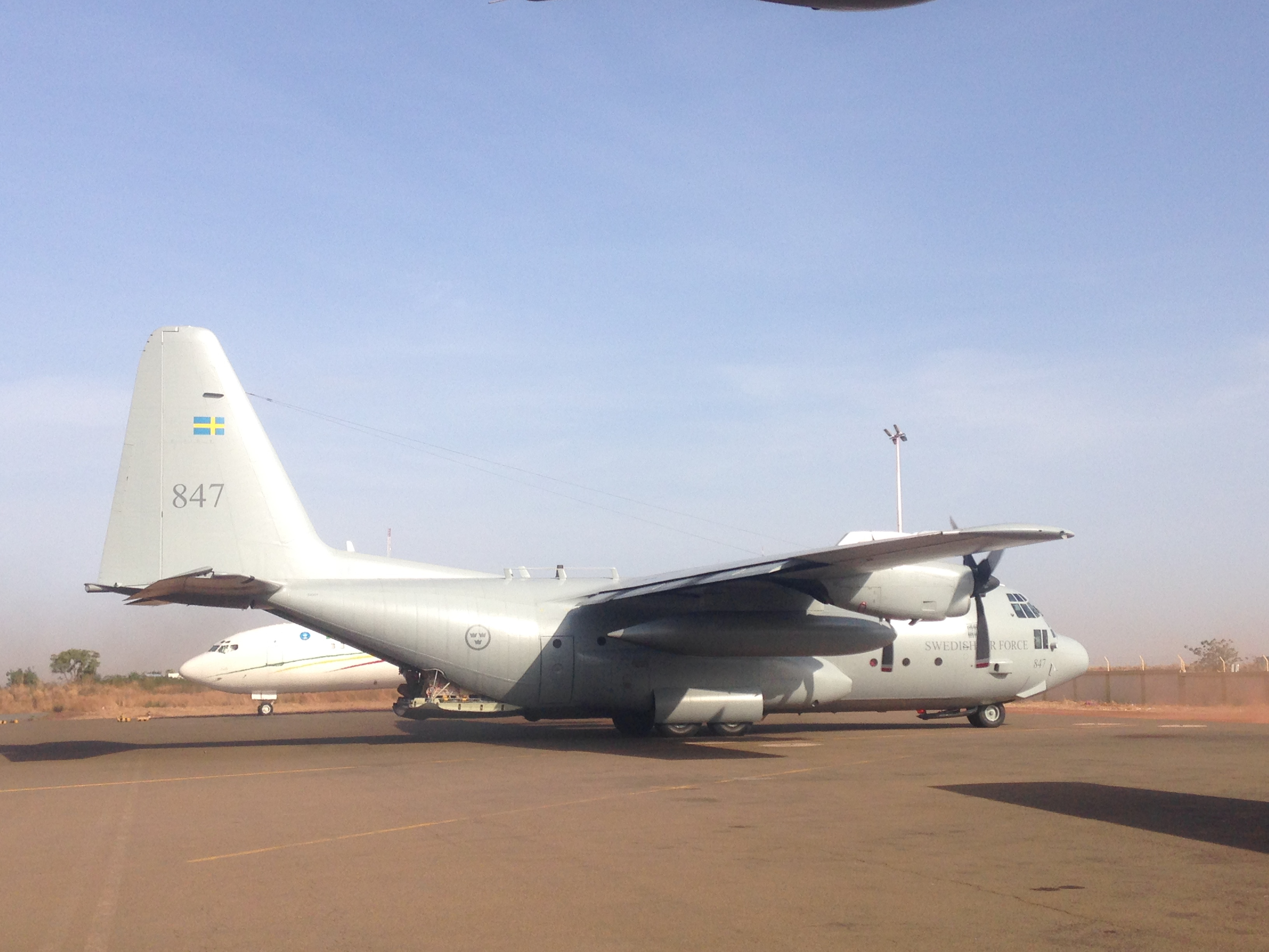 C-130 Hercules Swedish Air Force (84007)